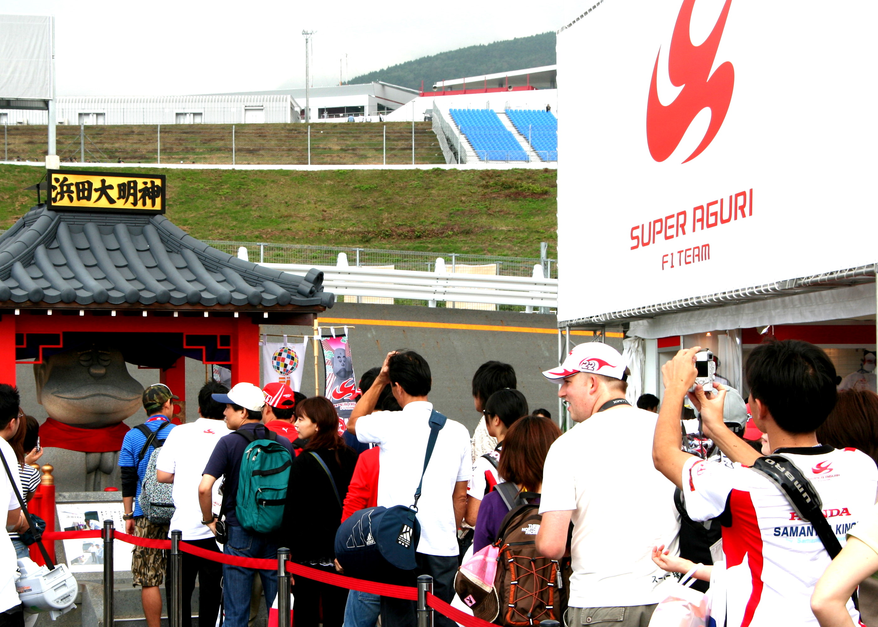 Fans de Super Aguri au GP du Japon2007.jpg